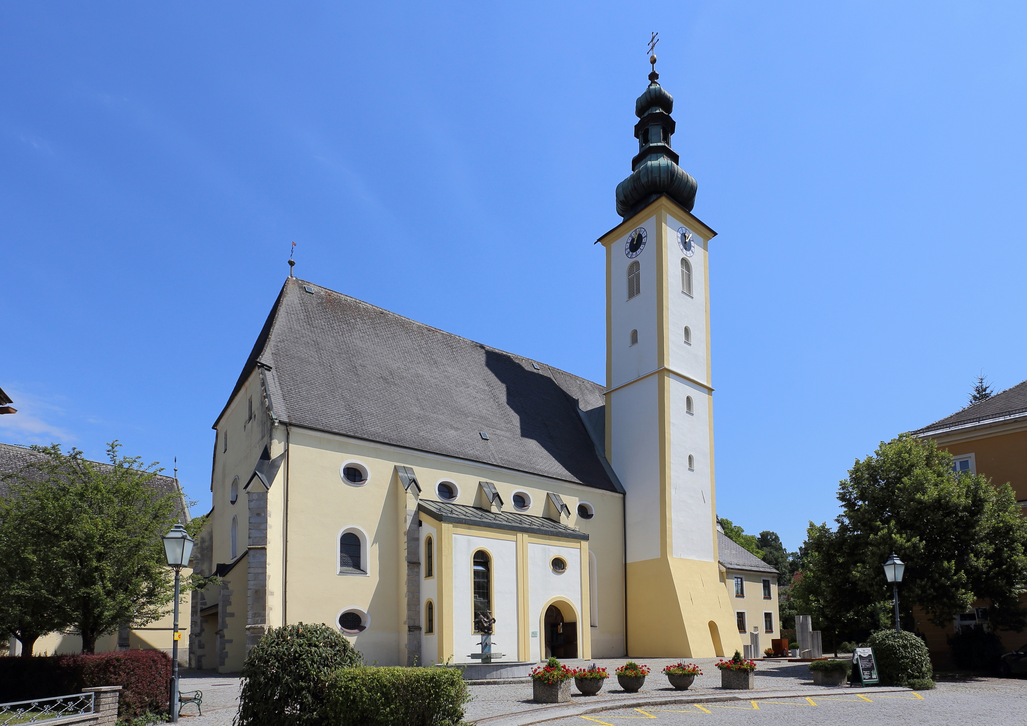 Katholische Pfarrkirche hl. Martin in der oberösterreichischen Stadt Peuerbach. Ursprünglich eine gotische Kirche. Nach dem Brand 1626 wurde die Kirche Mitte des 17. Jahrhunderts neu gewölbt und zum Teil barockisiert. Die Einrichtung stammt vorwiegend aus dem ersten Viertel bzw. Mitte des 18. Jahrhunderts.